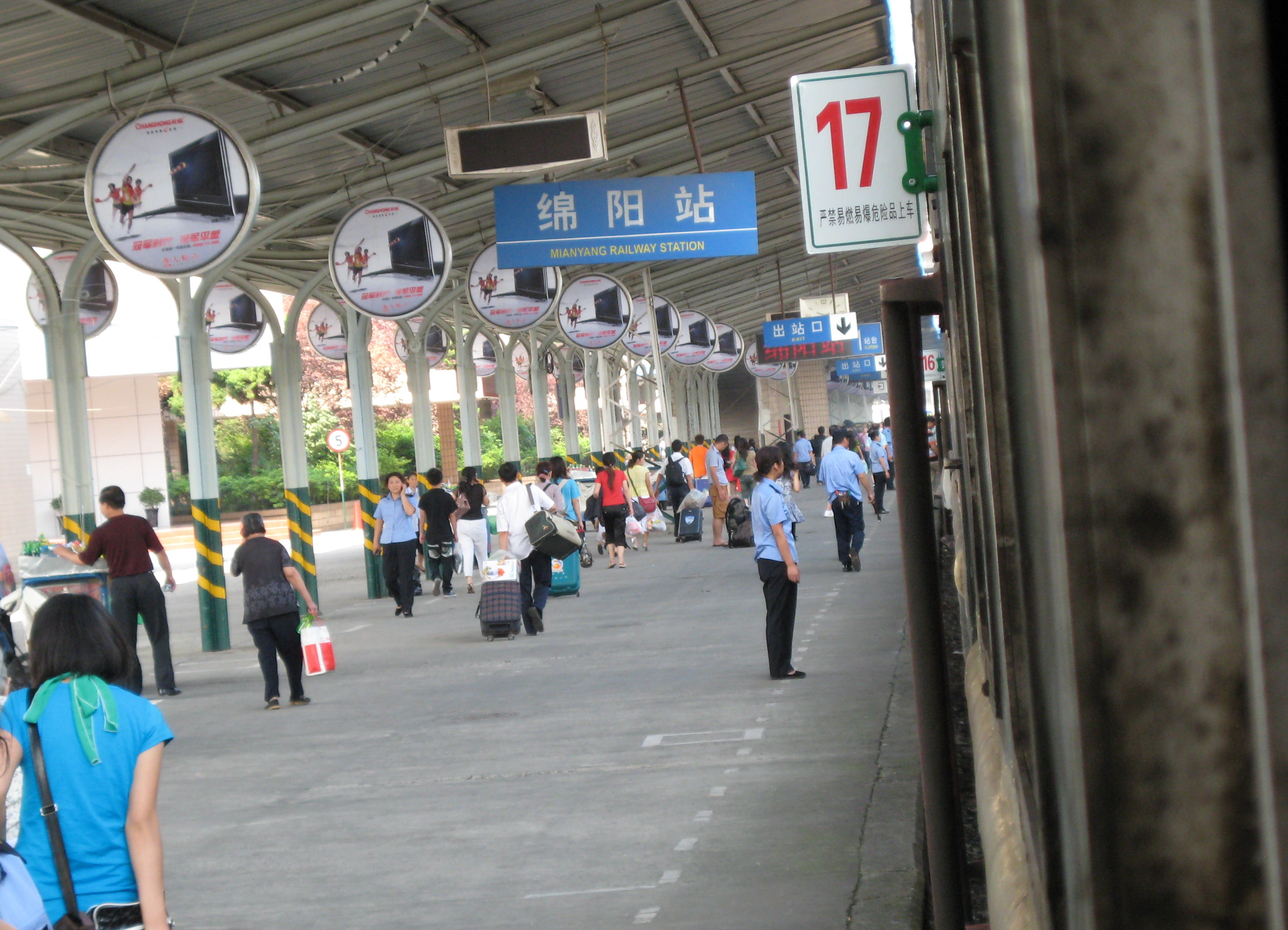 摄于2008年7月23日,绵阳火车站